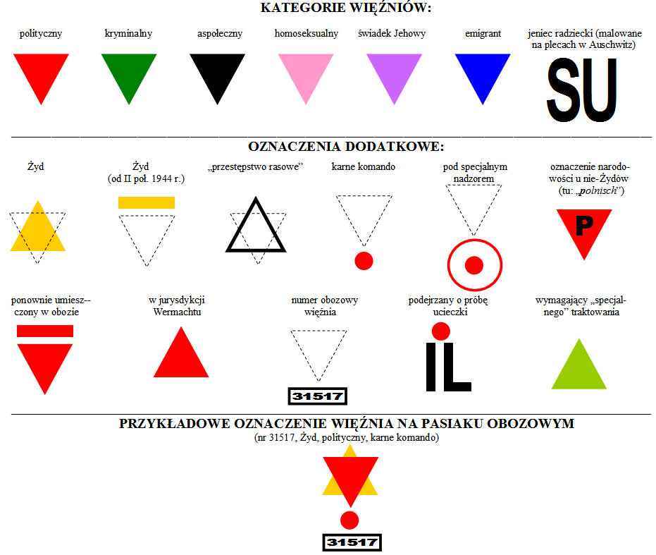 Oznaczenia więżniów obozów koncentracyjnych (Auschwitz-Birkenau, Dachau, Ravensbrück)